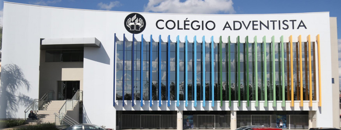 Colégios Adventistas